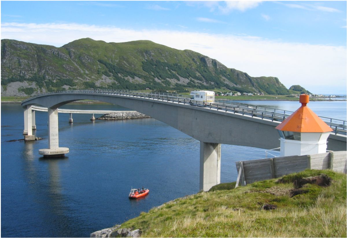 Rundebru - Brücke zur Insel Runde